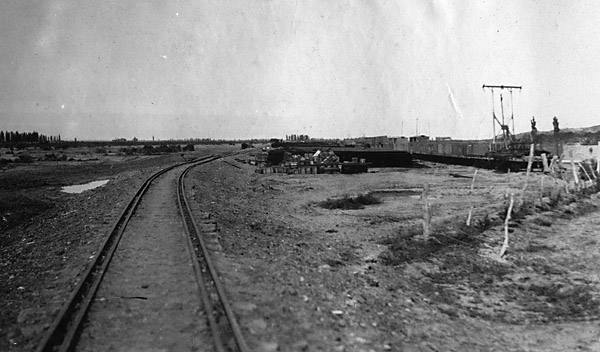 Vía bitrocha acercando probablemente el almacén para la obras nuevas cerca la estación Dolavon.